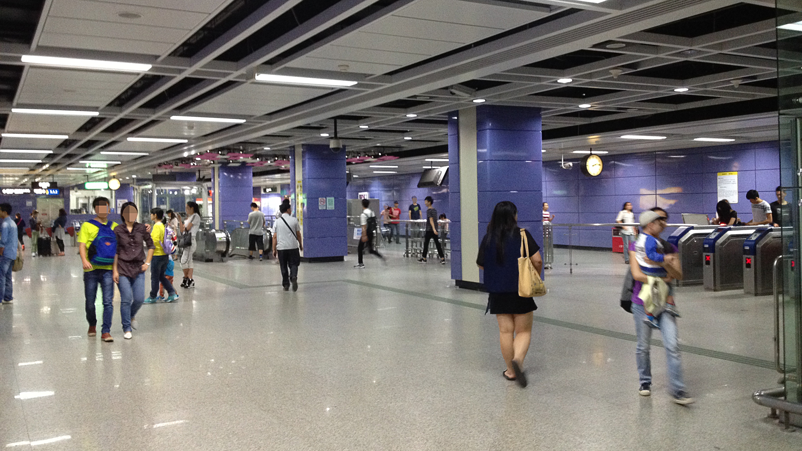 广州地铁大石站站厅